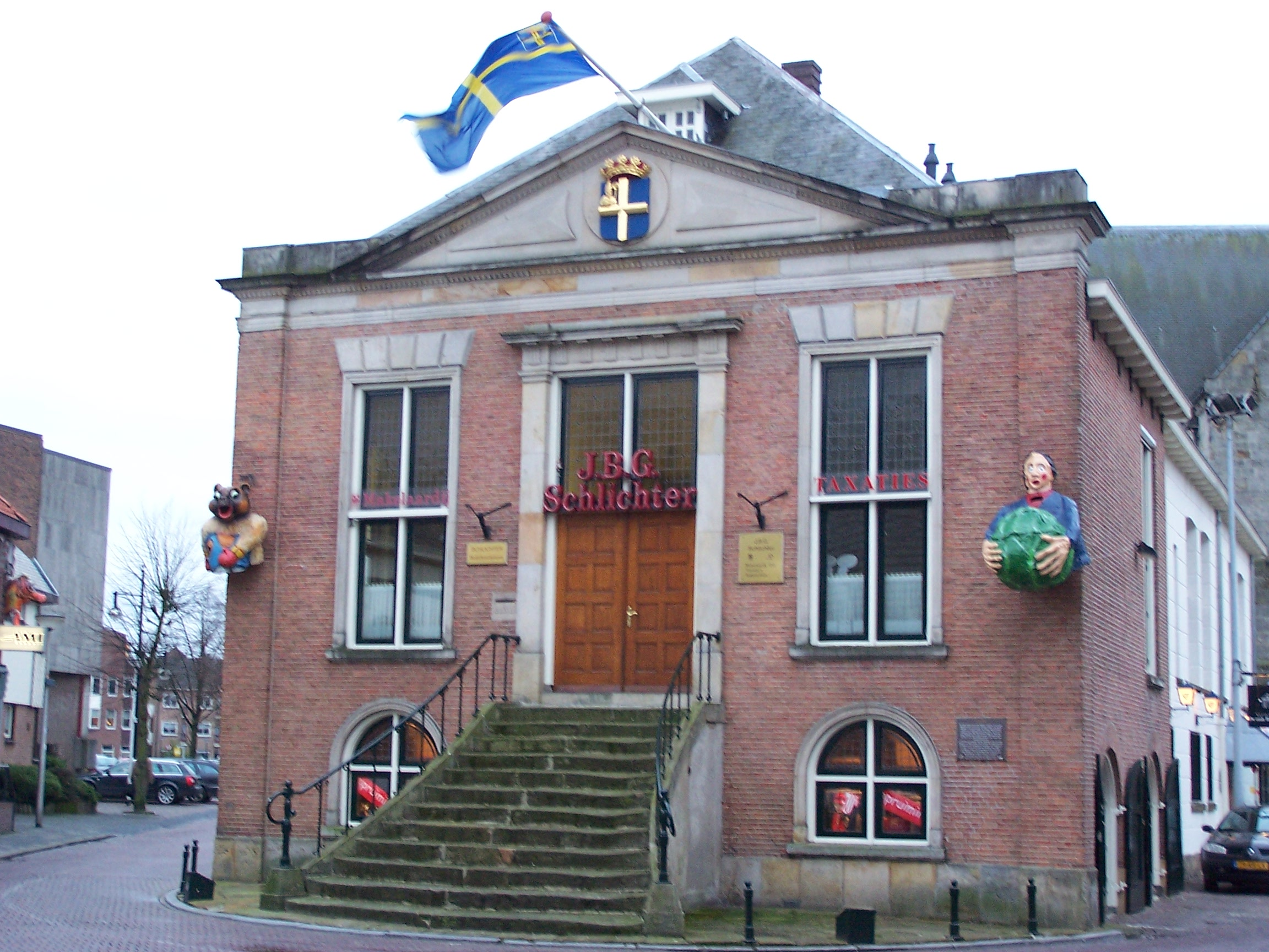 Oldenzaal: Old town hall of Oldenzaal